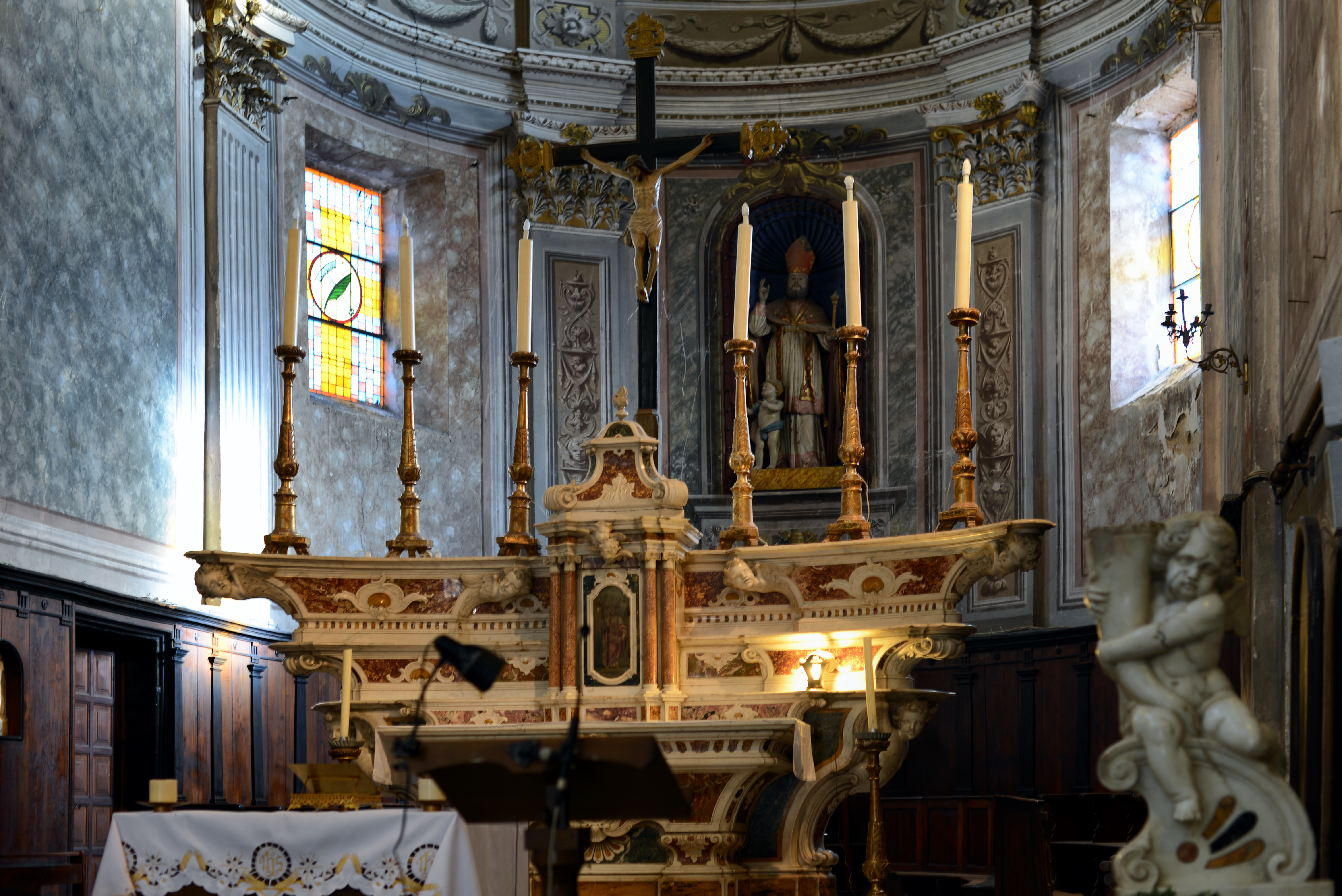 Calenzana, Balagne (Haute-Corse) - Maître-autel et tabernacle de l'église paroissiale Saint-Blaise (San Biasgiu) du XVIIe siècle, classés Monument historique par arrêté du 16 mars 1908